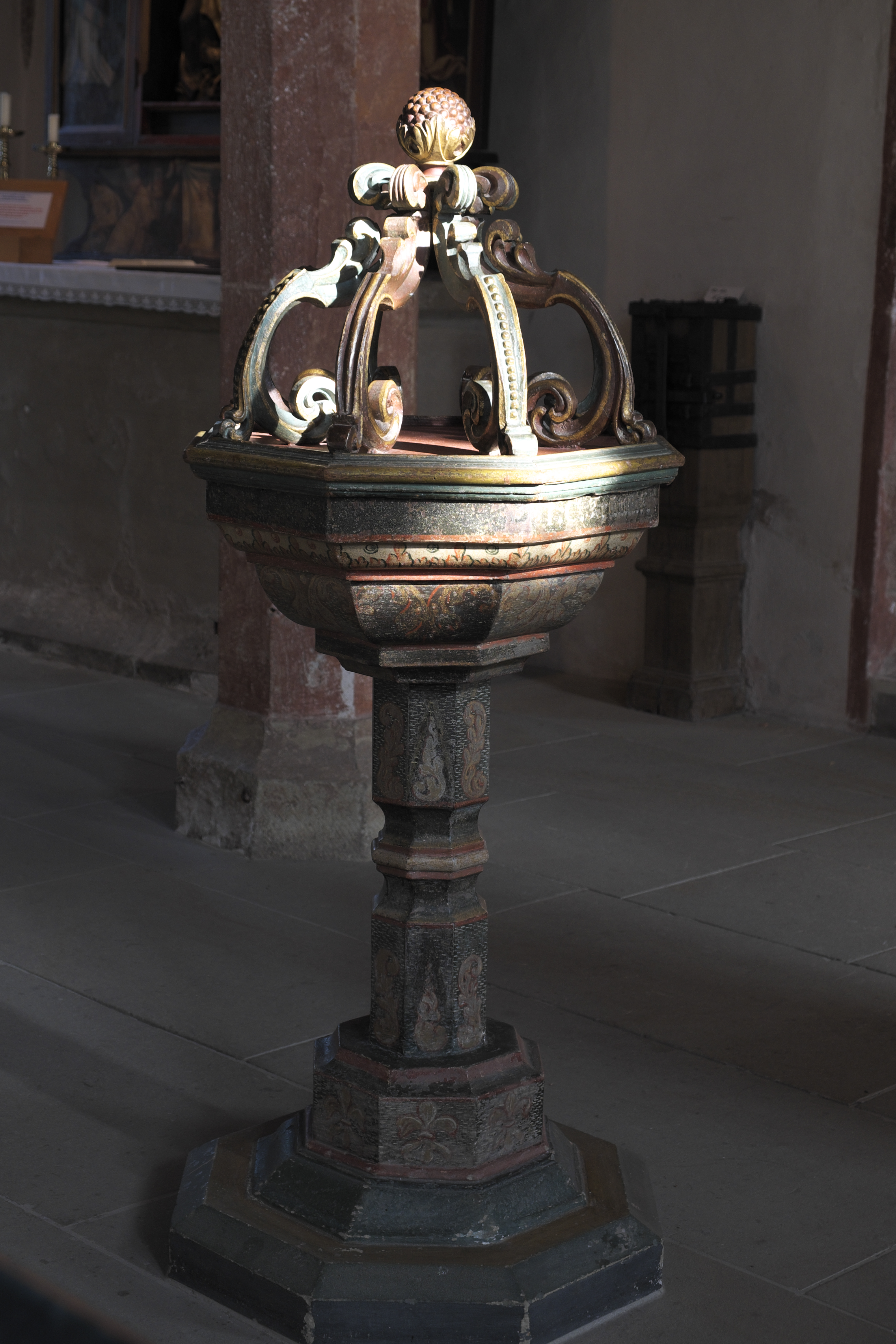 Evangelisch-Lutherische Kirche St. Peter und Paul in Detwang, einem Stadtteil von Rothenburg ob der Tauber in Mittelfranken (Bayern), Taufbecken von 1720